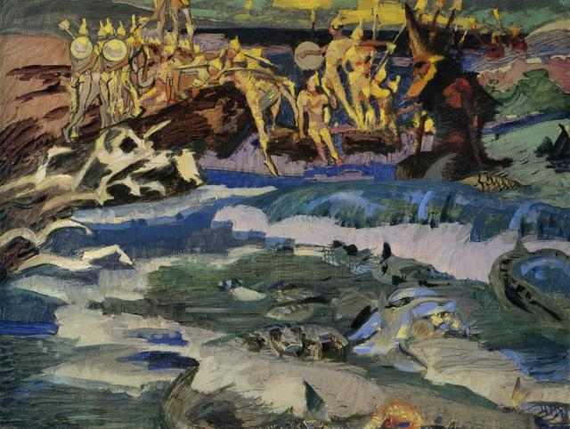 Картина принадлежит серии работ художника в живописи, графике и керамике, посвященных юбилею А.С.Пушкина и обязанных своим появлением в равной мере как стихам поэта, музыке Н.А. Римского-Корсакова для оперы «Сказка о царе Салтане», так и русскому фольклору.